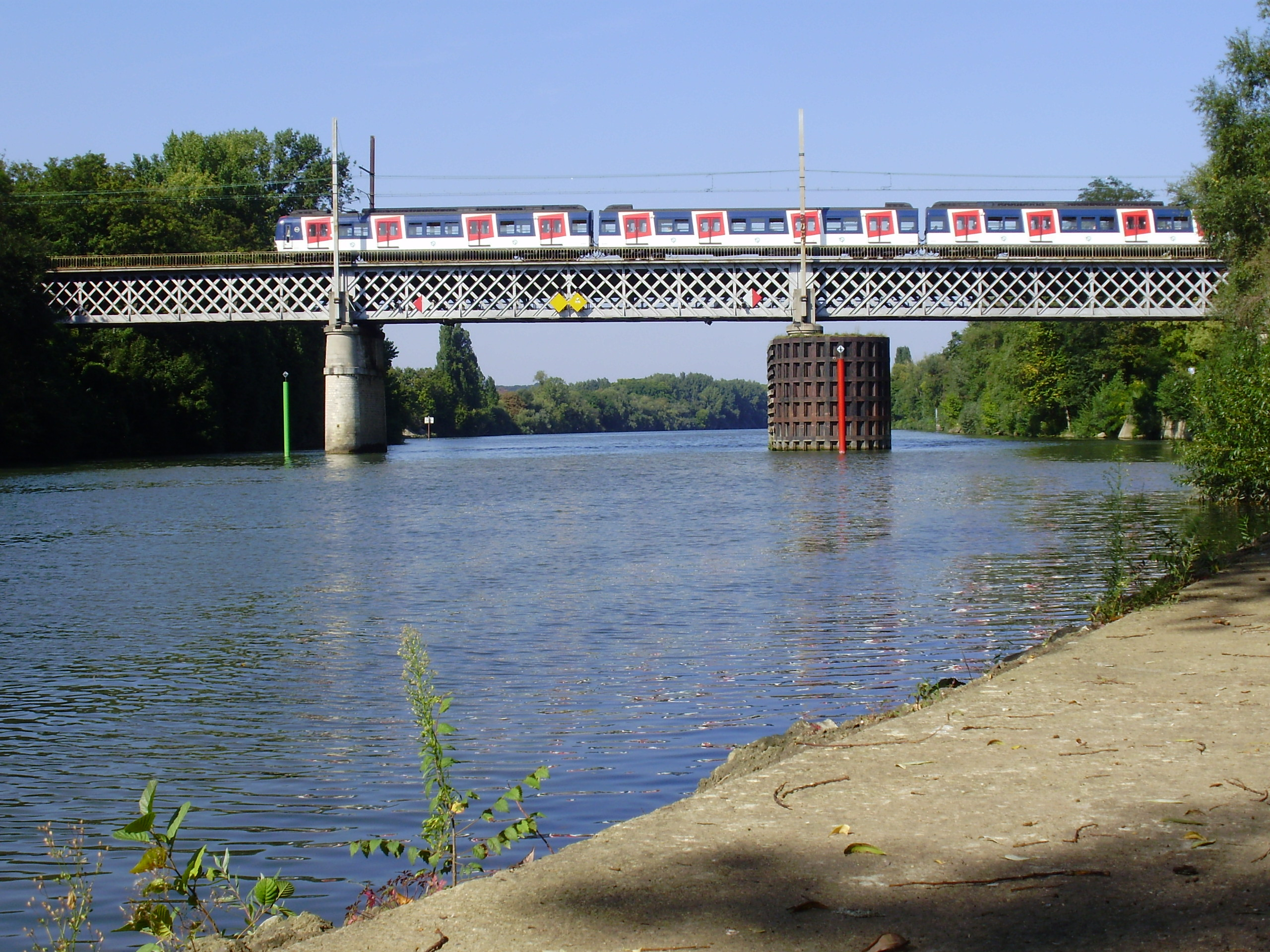 Viaduc ferroviaire du Pecq, Yvelines, France, vu depuis le boulevard Folke-Bernadotte (côté sud du viaduc) au Pecq.